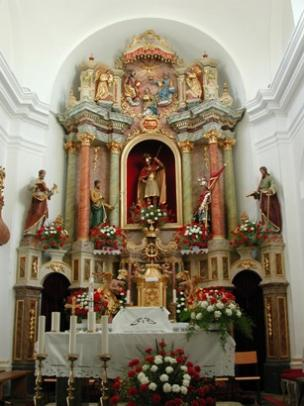 Oltar sv. Jurija v Župnijski cerkvi v Dobrniču